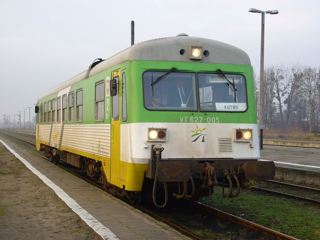 VT627-005 na stacji w Sierpcu jako pociąg do Kutna (Koleje Mazowieckie).